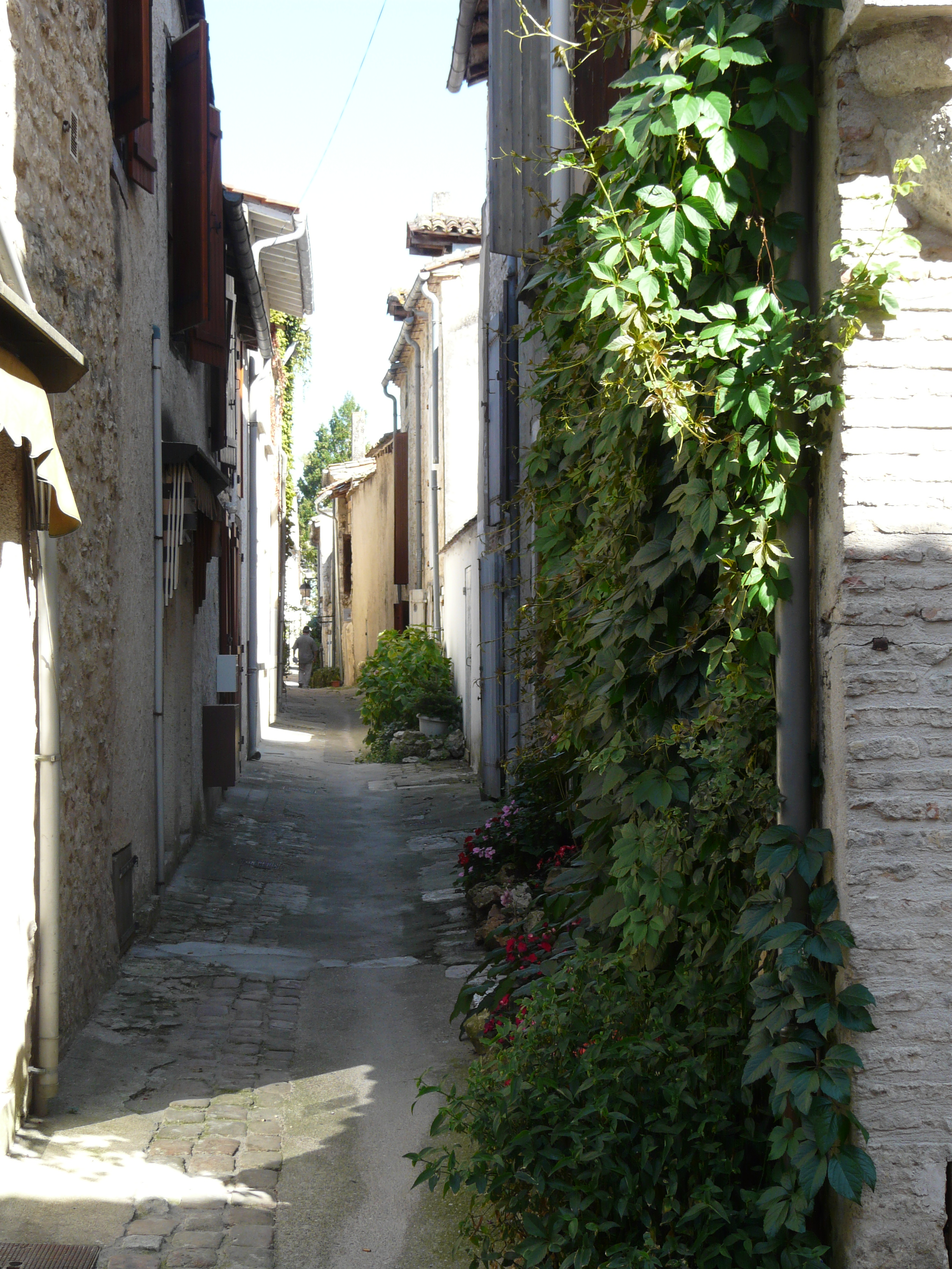 Un carreyrou (une venelle) dans la bastide d'Eymet, Dordogne, France